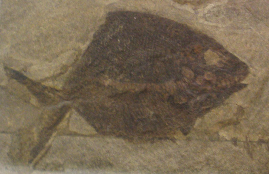 Fossil of Platysomus, an extinct fish